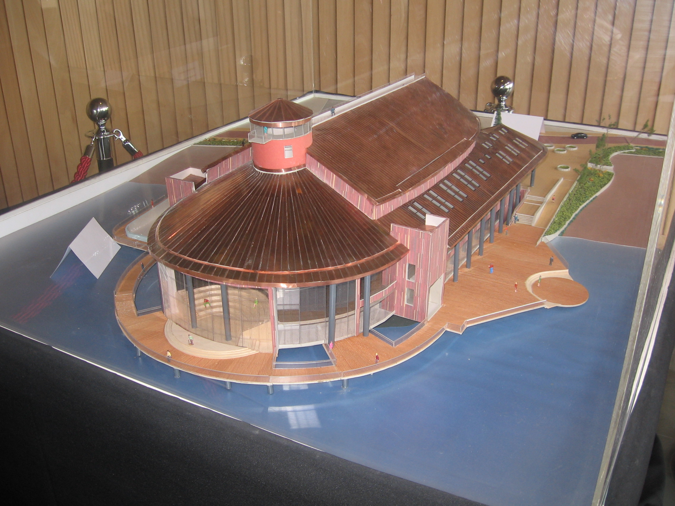 Modelo del Teatro del lago, ubicado en su acceso principal.